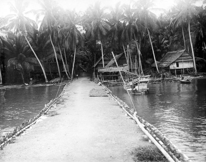 Repronegatief. Een nieuwe weg te Kadjang, Bantaeng, Zuid-Celebes